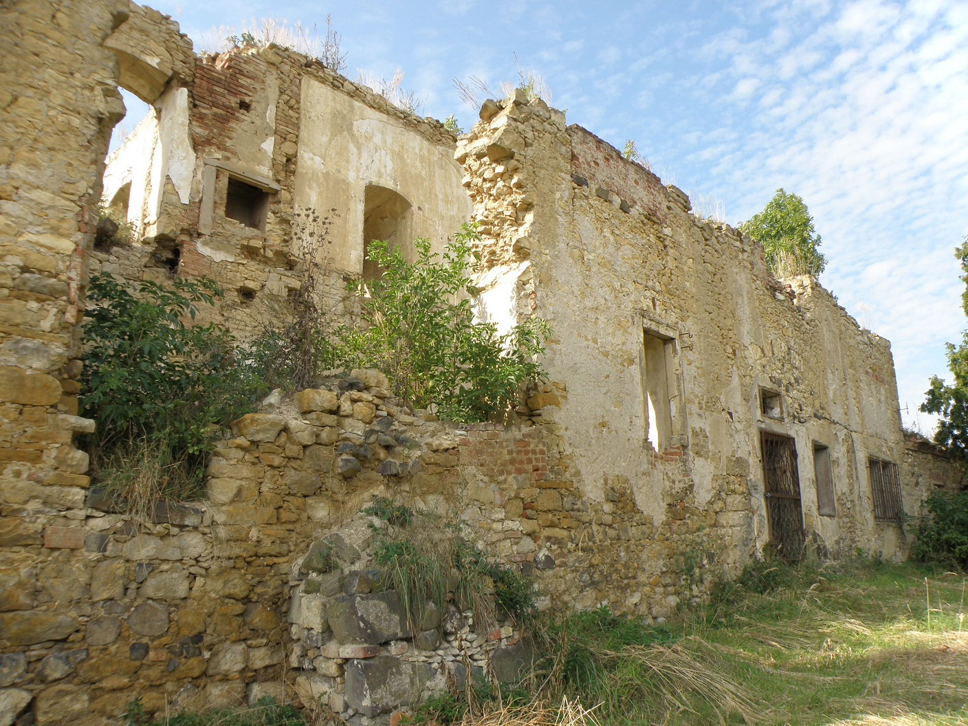 Zámek, částečná zřícenina Libčeves, Libčeves